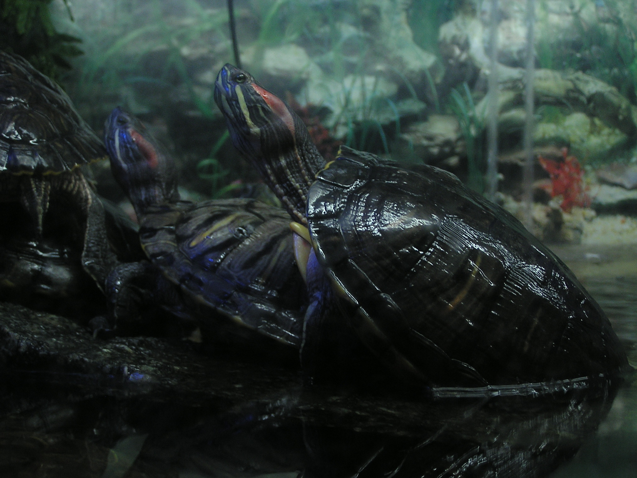 Trachemys scripta elegans